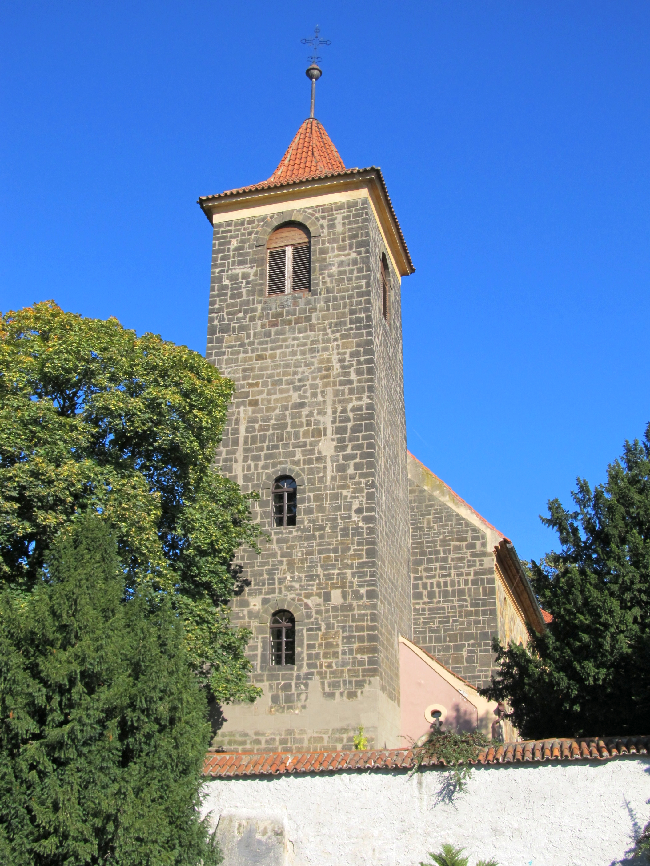 Kostel Nanebevzetí P. Marie (Čelákovice), S okraj obce, na mírném návrší, Čelákovice